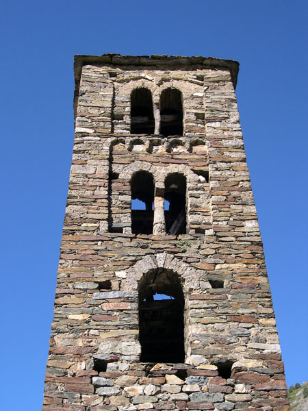 Església de Sant Joan de Caselles (parròquia de Canillo, Andorra)